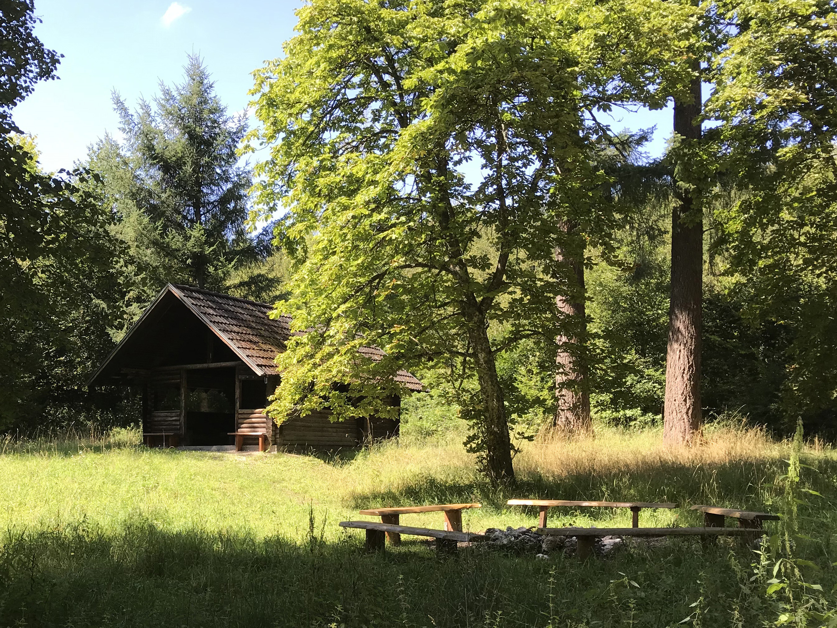 Oberkochen - Bilzhütte im Hinteren Tiefental. Nicht zu verwechseln mit dem nahegelegenen Bilzhaus.